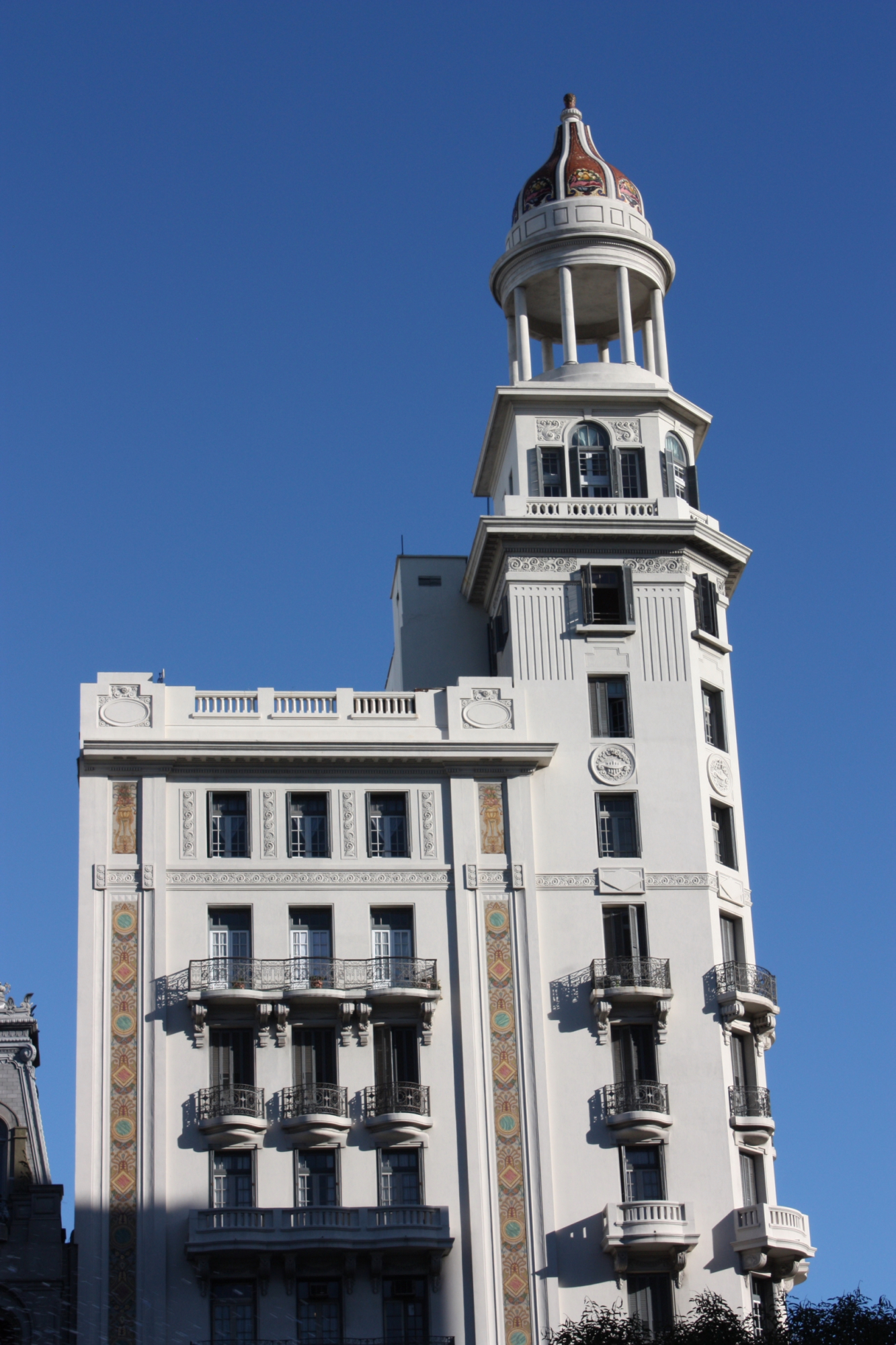 El Edificio Rex, (Monumento Histórico Nacional), Avda. 18 de Julio 1002/1006/1012, esq. Julio Herrera y Obes, frente a la Plaza del Entrevero. Vista de la fachada sobre 18 de Julio. Montevideo.